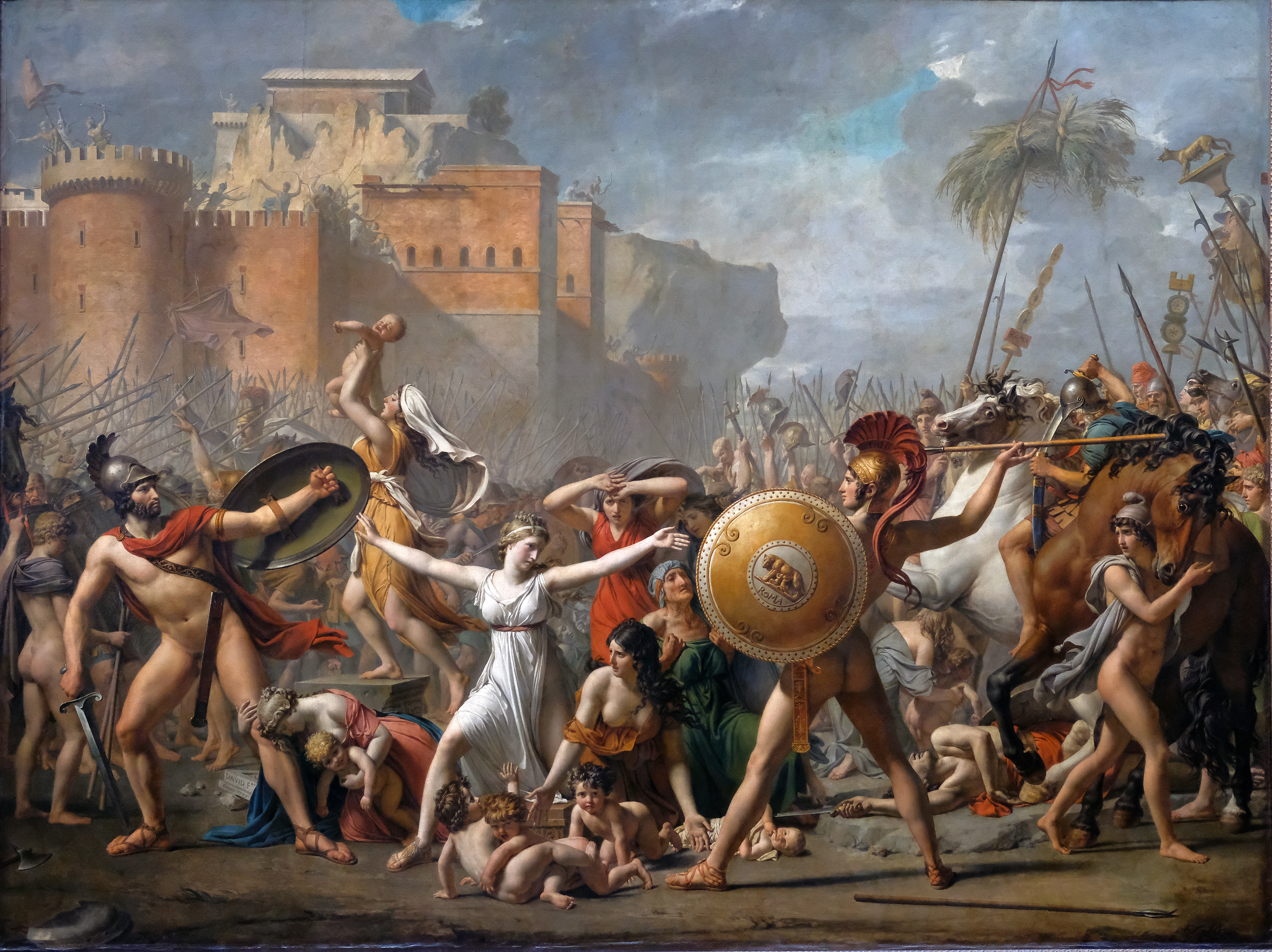 Donne e bambini che si interpongono tra i loro uomini e i romani.C'è un invito a una riconciliazione nazionale